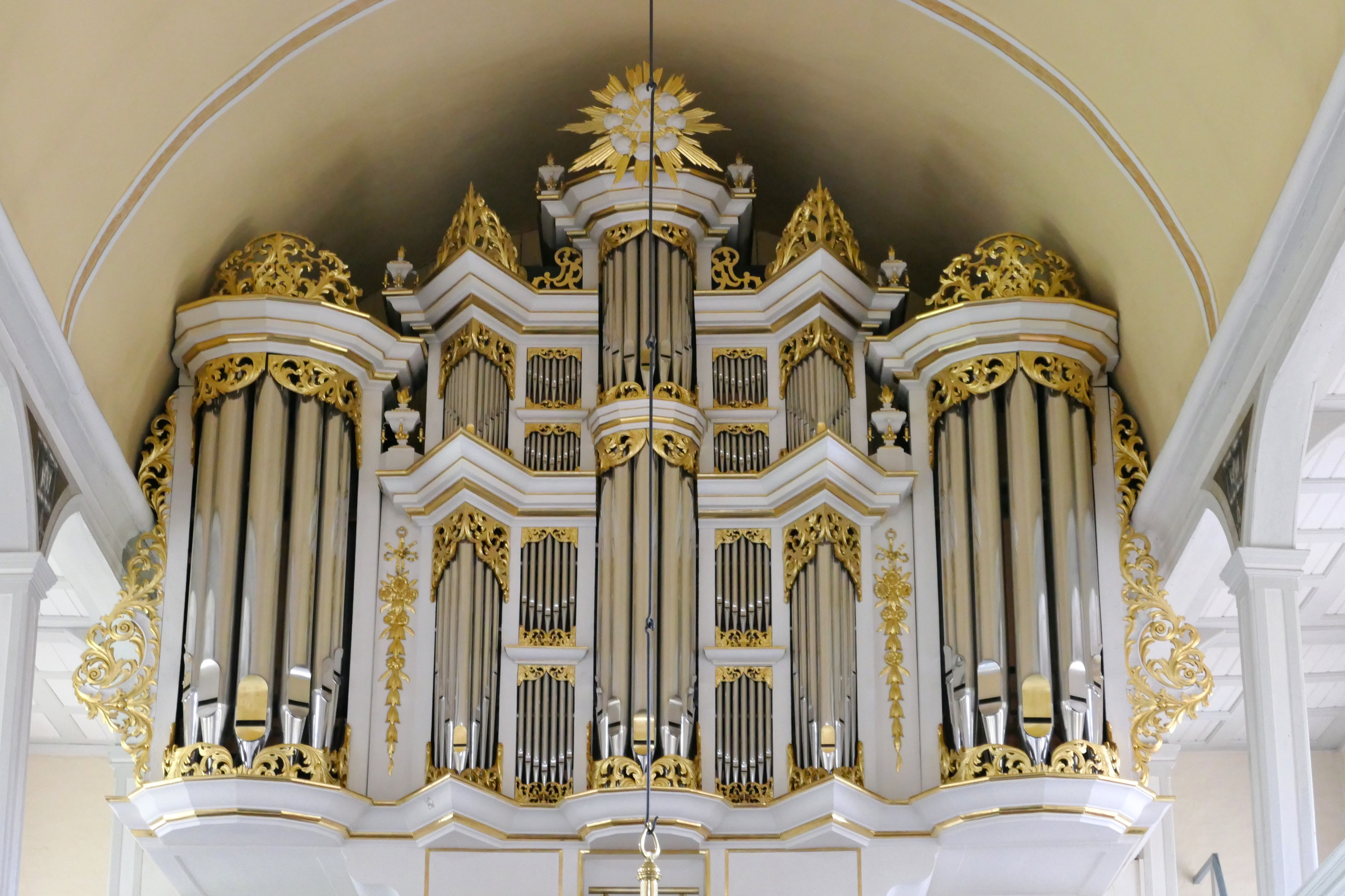 St. Georg Gartow, Landkreis Lüchow-Dannenberg, Niedersachsen, Deutschland